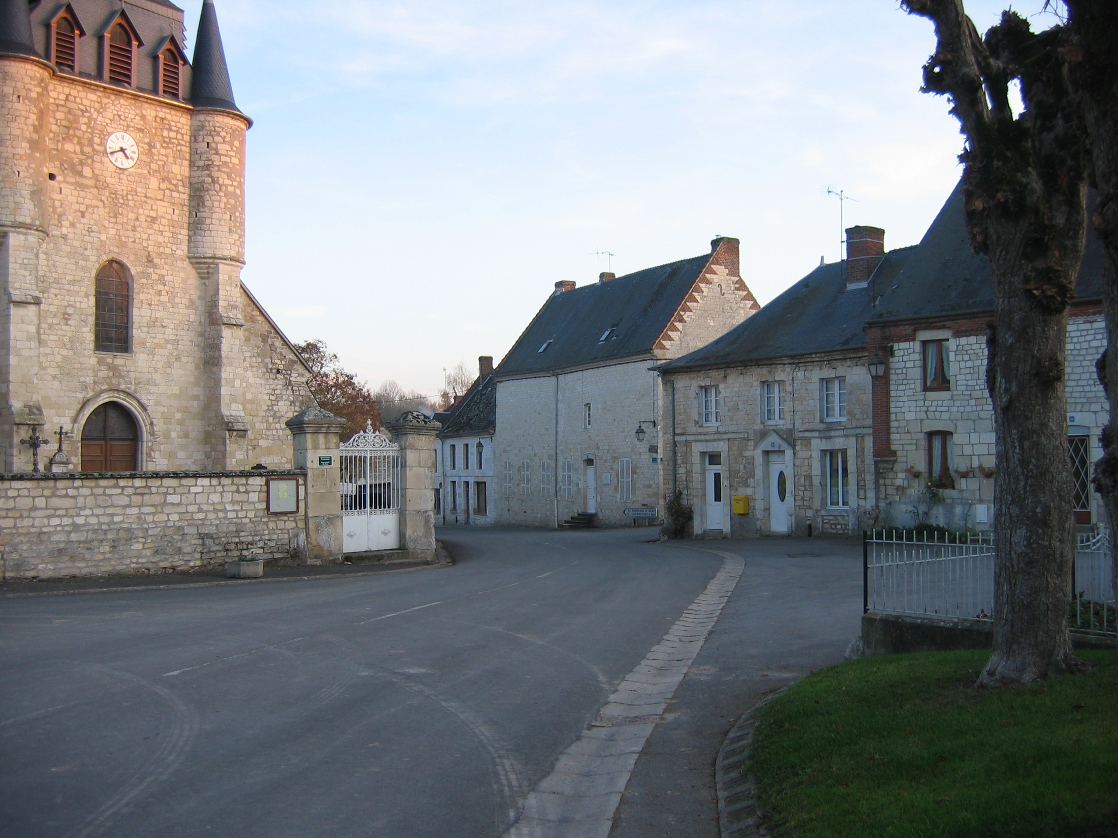 demeures en craie et église au centre de Sévigny-Waleppe Ardennes France